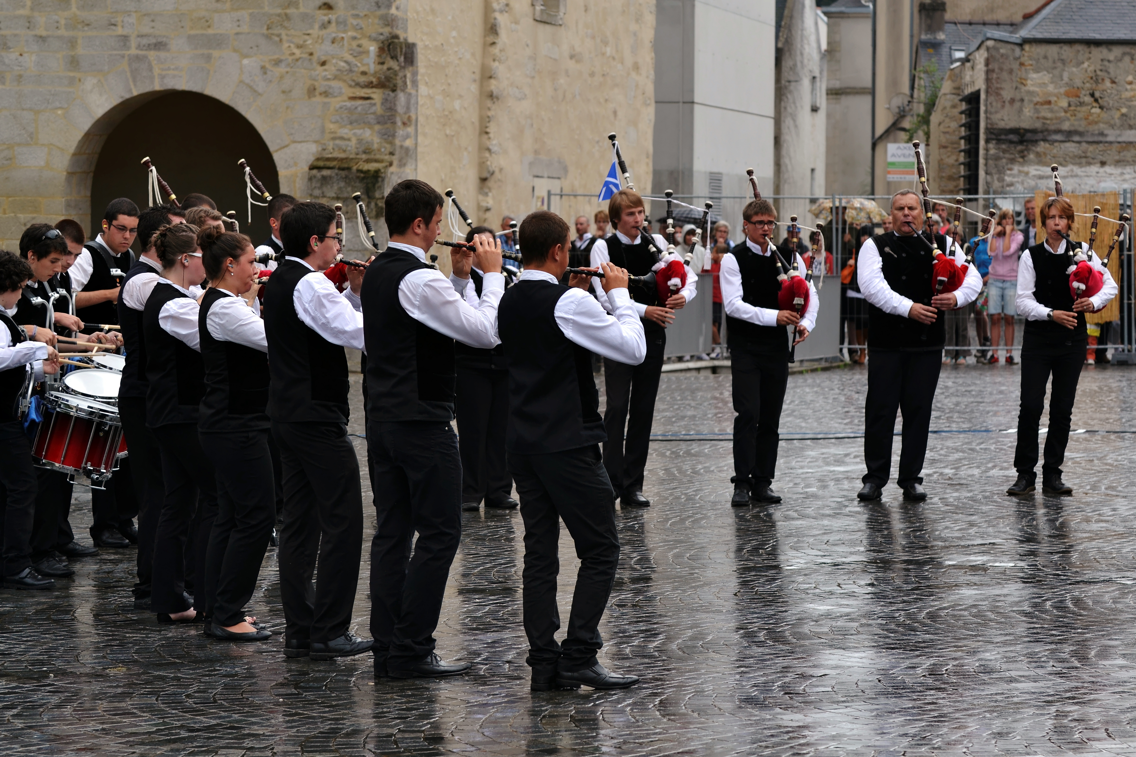 Le Bagadig Cap Caval lors du championnat national des bagadoù (troisième catégorie) au Festival de Cornouaille, Esplanade François Mitterrand à Quimper, le 27 juillet 2013.